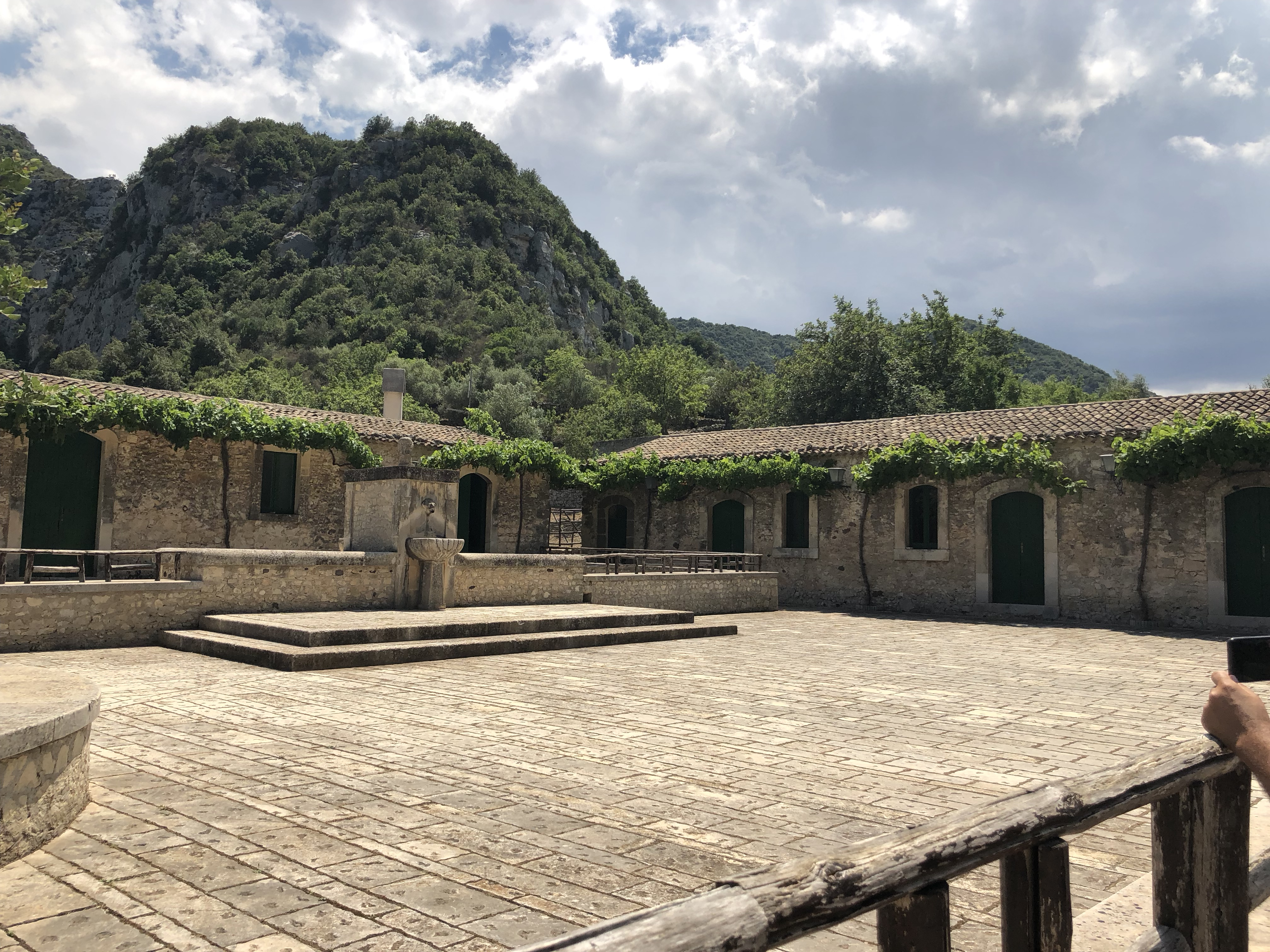 Case specchi